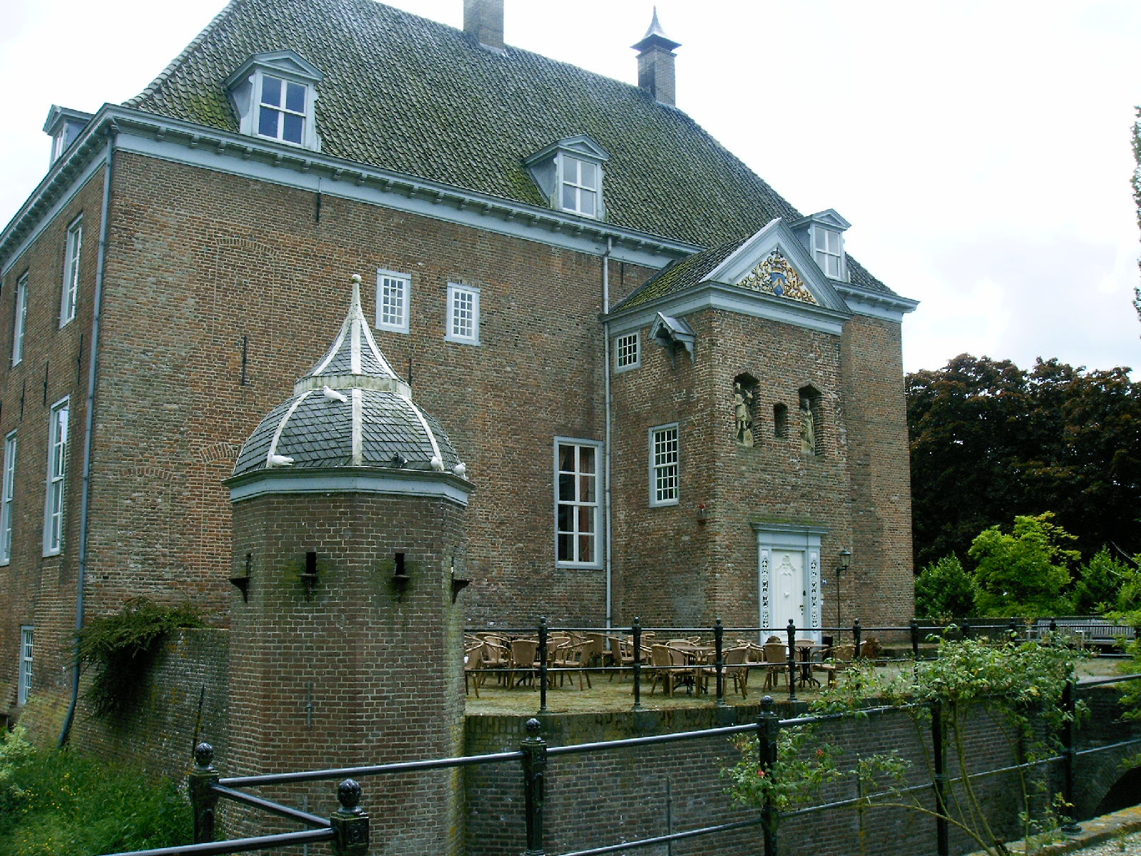 Foto van kasteel ophemert